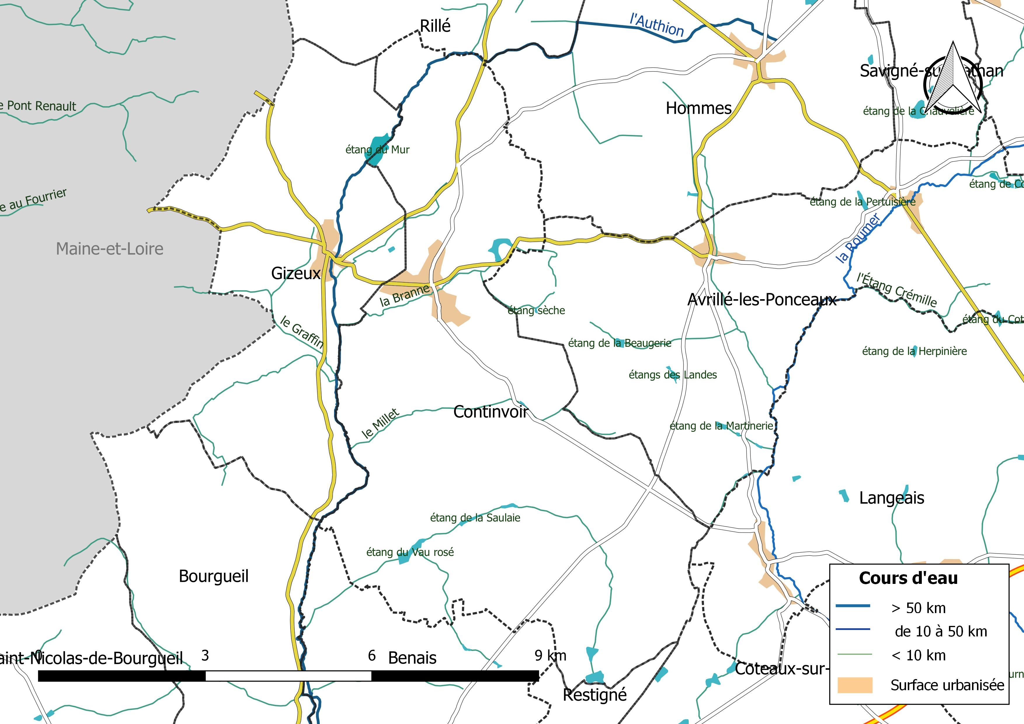 Carte du réseau hydrographique de la commune de Continvoir (France).